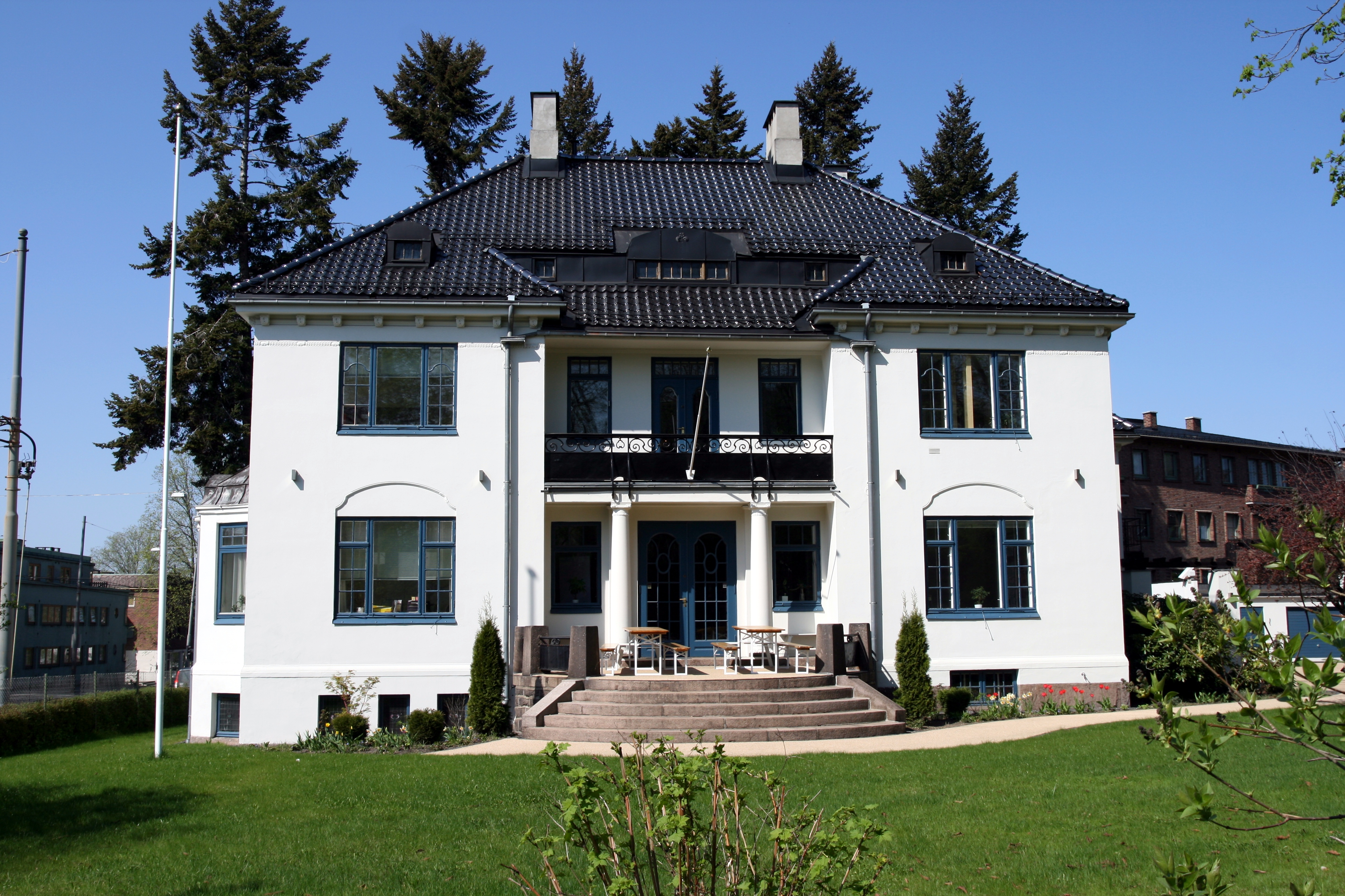 Drammensveien 111b i Oslo. Bygningen er en del av den tidligere løkken Frederiksberg, og var i sin tid DDRs ambassade i Norge. Nå tilhører bygningen tysk-norsk handelskammer.